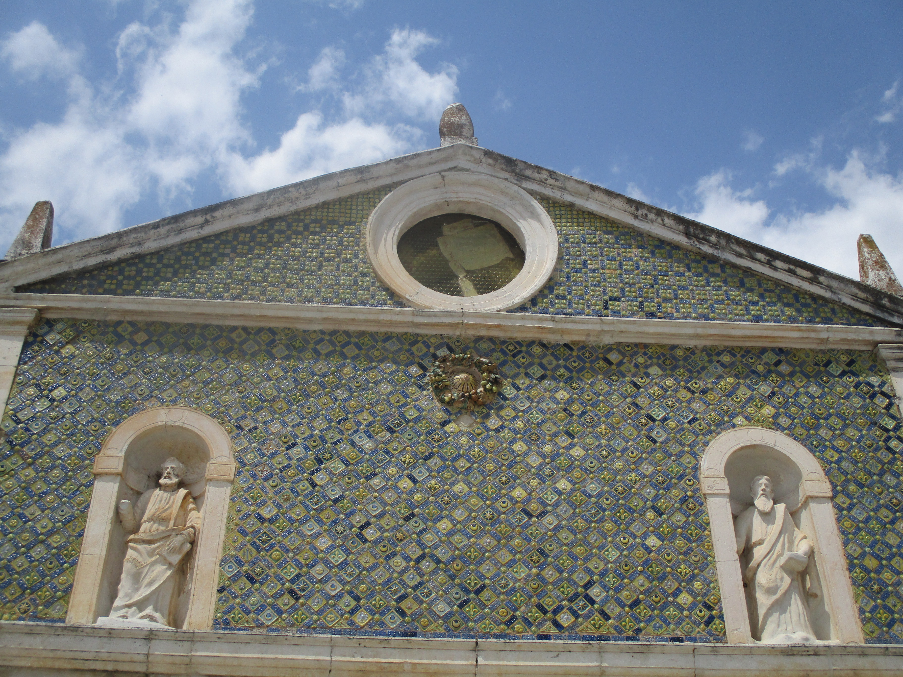 Le maioliche